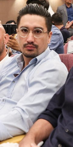 معارفه آندره استراماچونی سرمربی جدید تیم فوتبال استقلال تهران